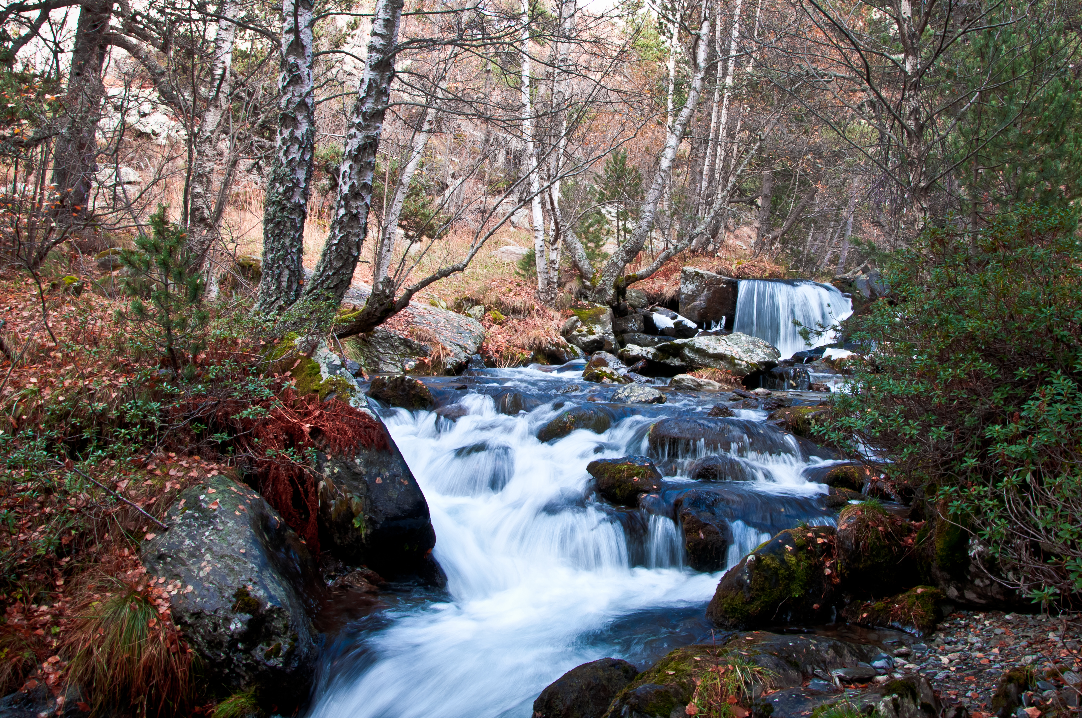 Riu de Sorteny This is a a photo of a river in Andorra with id: IEA-R-49